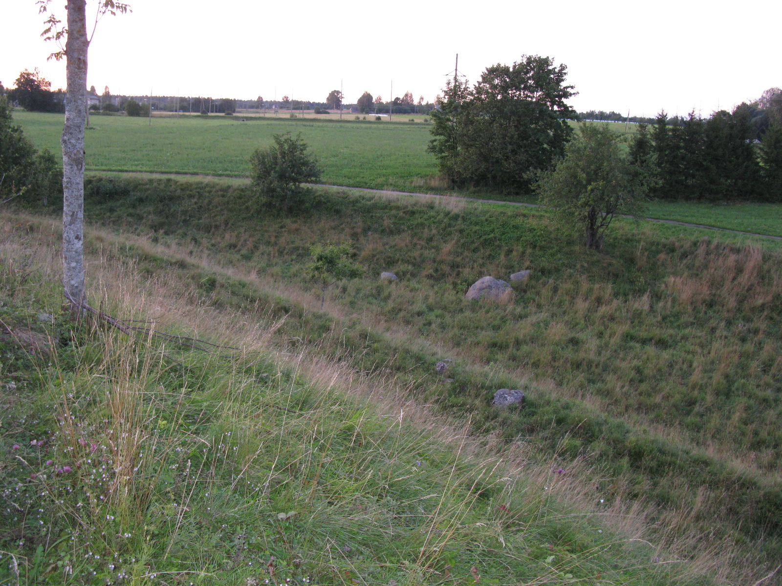 Vallikraavi kulgemine vaatega kirdesse.